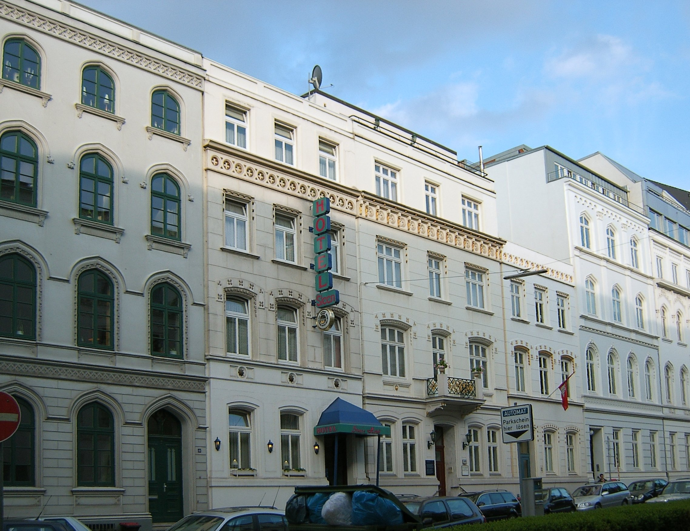 Die Häuser Nr. 39 bis 51 auf der Ostseite des Holzdammes sind um 1850 erbaut worden. Verbindendes Element ist die gotisierende Fassade.